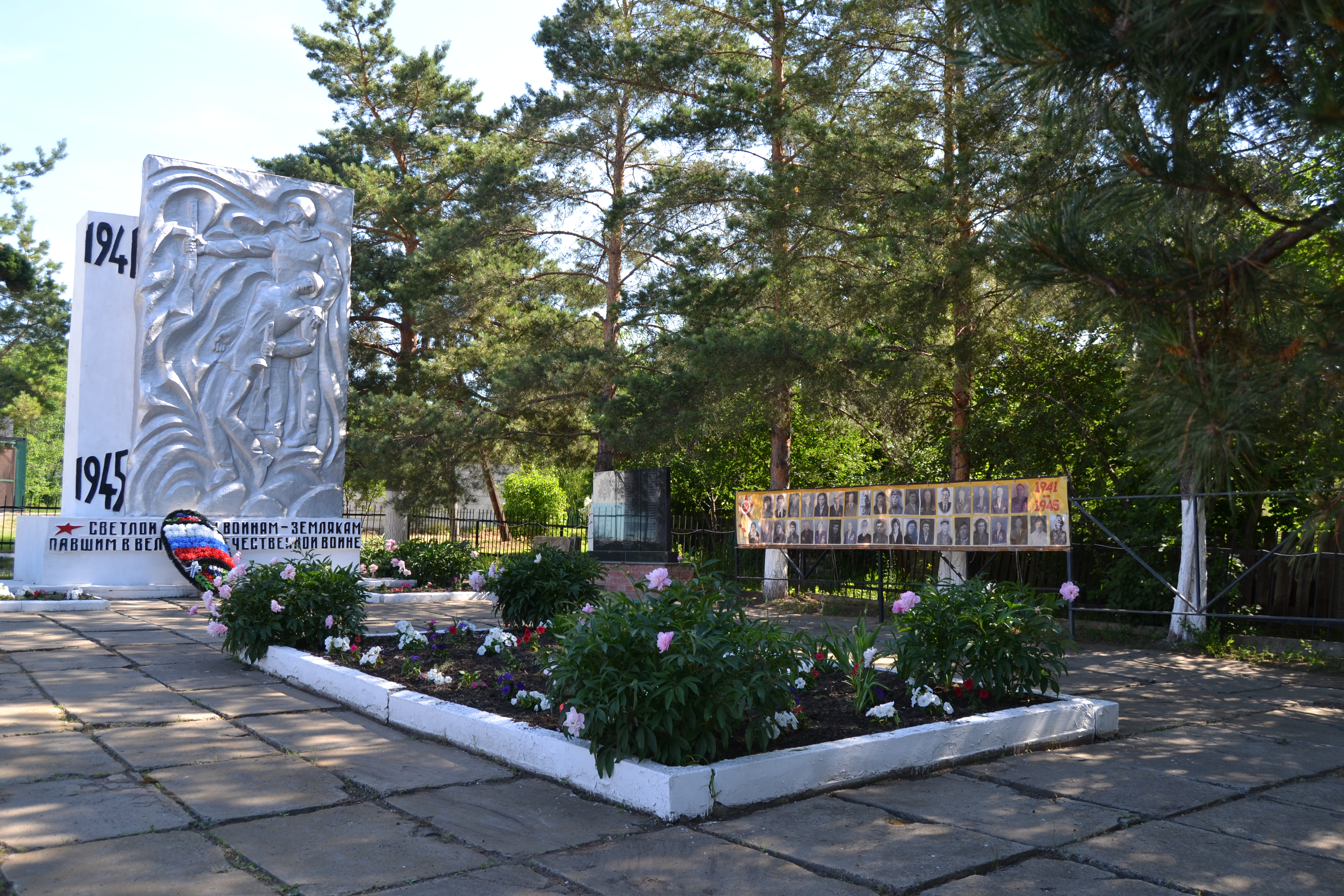 Изображение населённого пункта. Мемориал Победы (Расково)